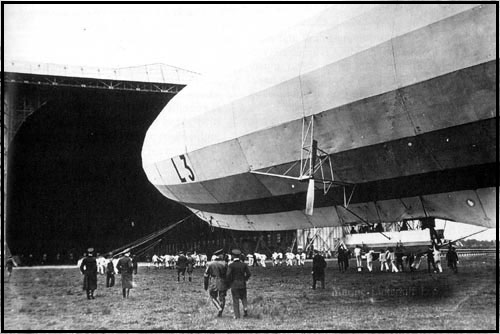 L 3 i Fuhlsbüttel ved Hamborg